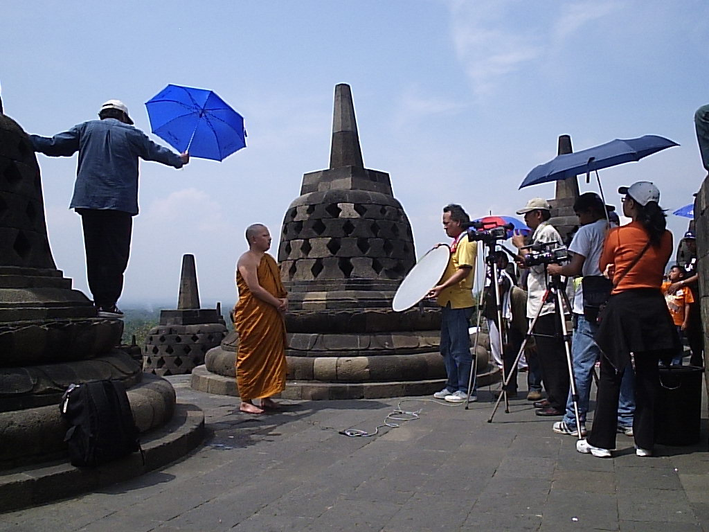 Produksi Renungan Budha (RCTI) di Borobudur.